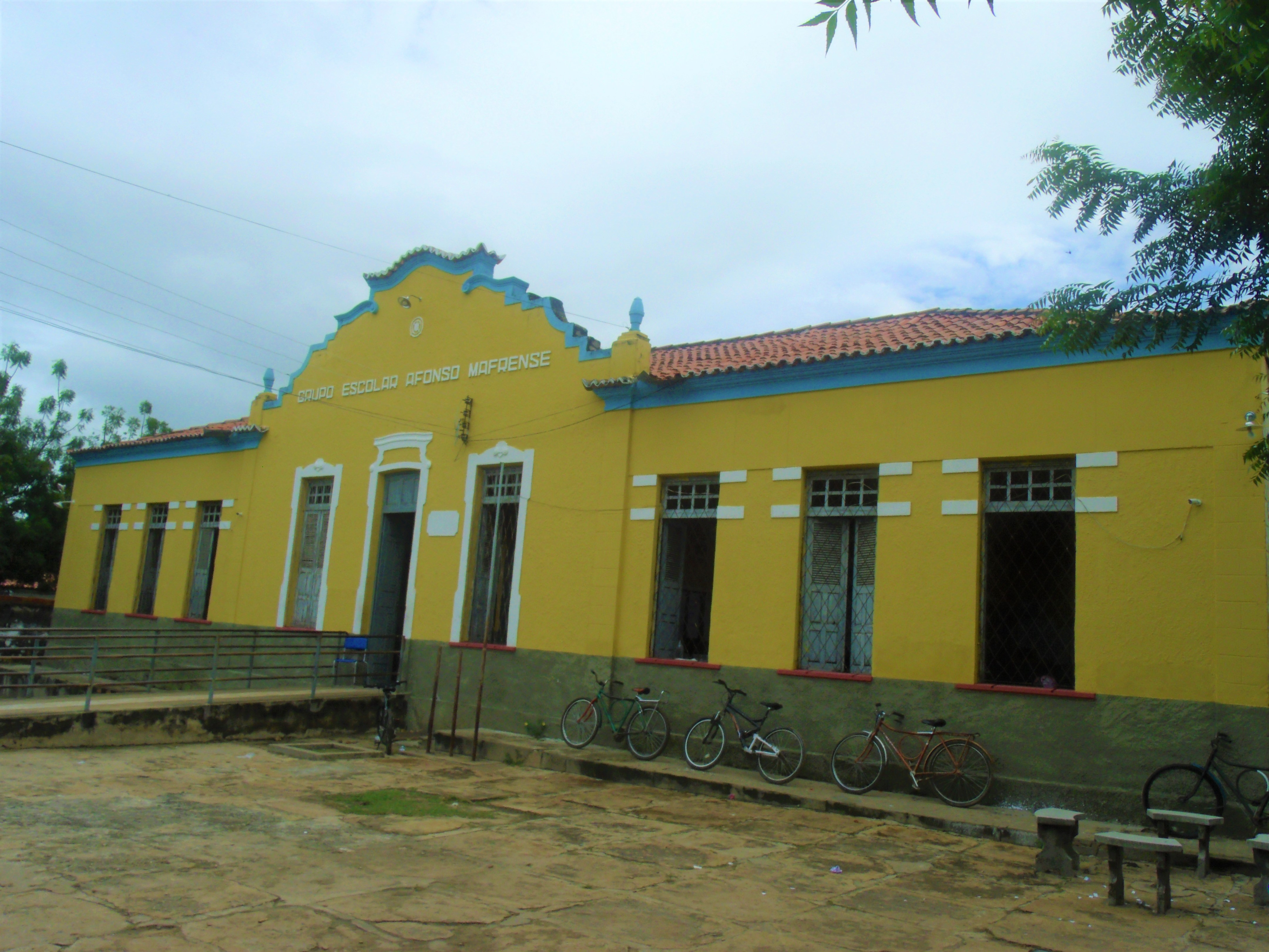 Vista da frente do Grupo Escolar Afonso Mafrense em Altos-Piauí, mantido pela Secretaria de Educação do Estado do Piauí